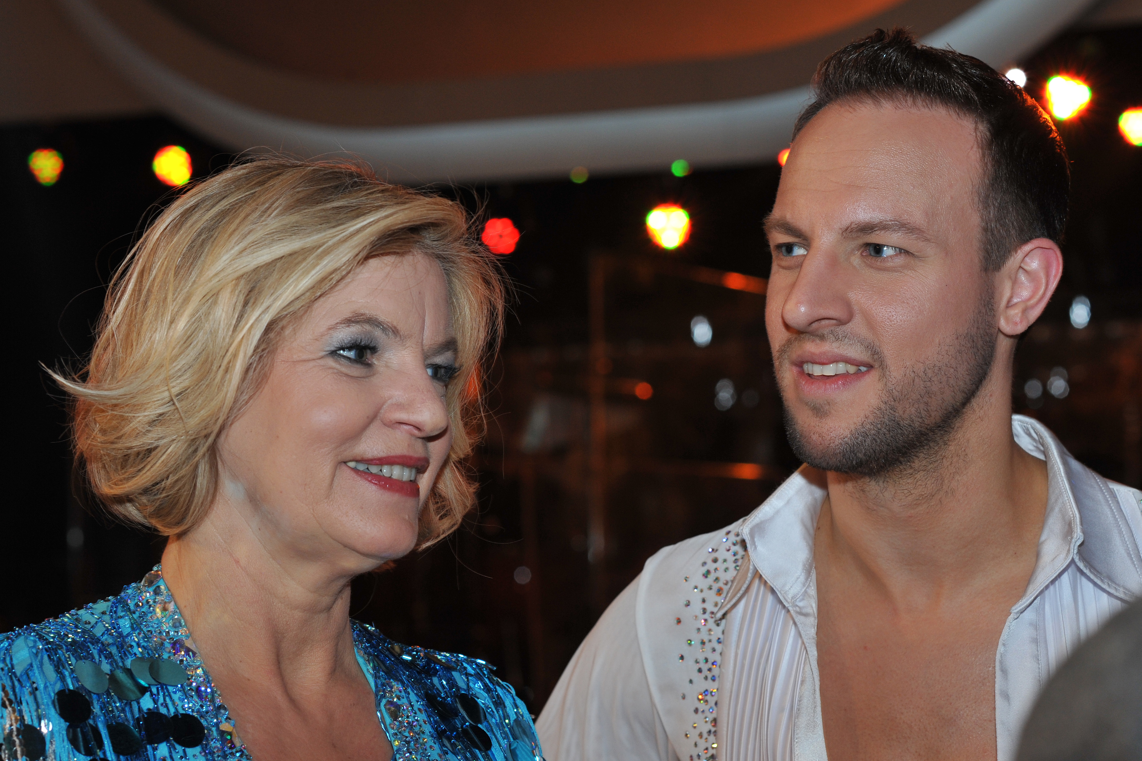 "Dancing Stars" am 7. März 2014: Andrea Puschl und Christoph Santner